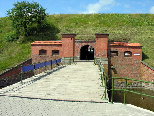 Lietuvos jūrų muziejus Foto: Algirdas, 2006 m. birželio 29 d.